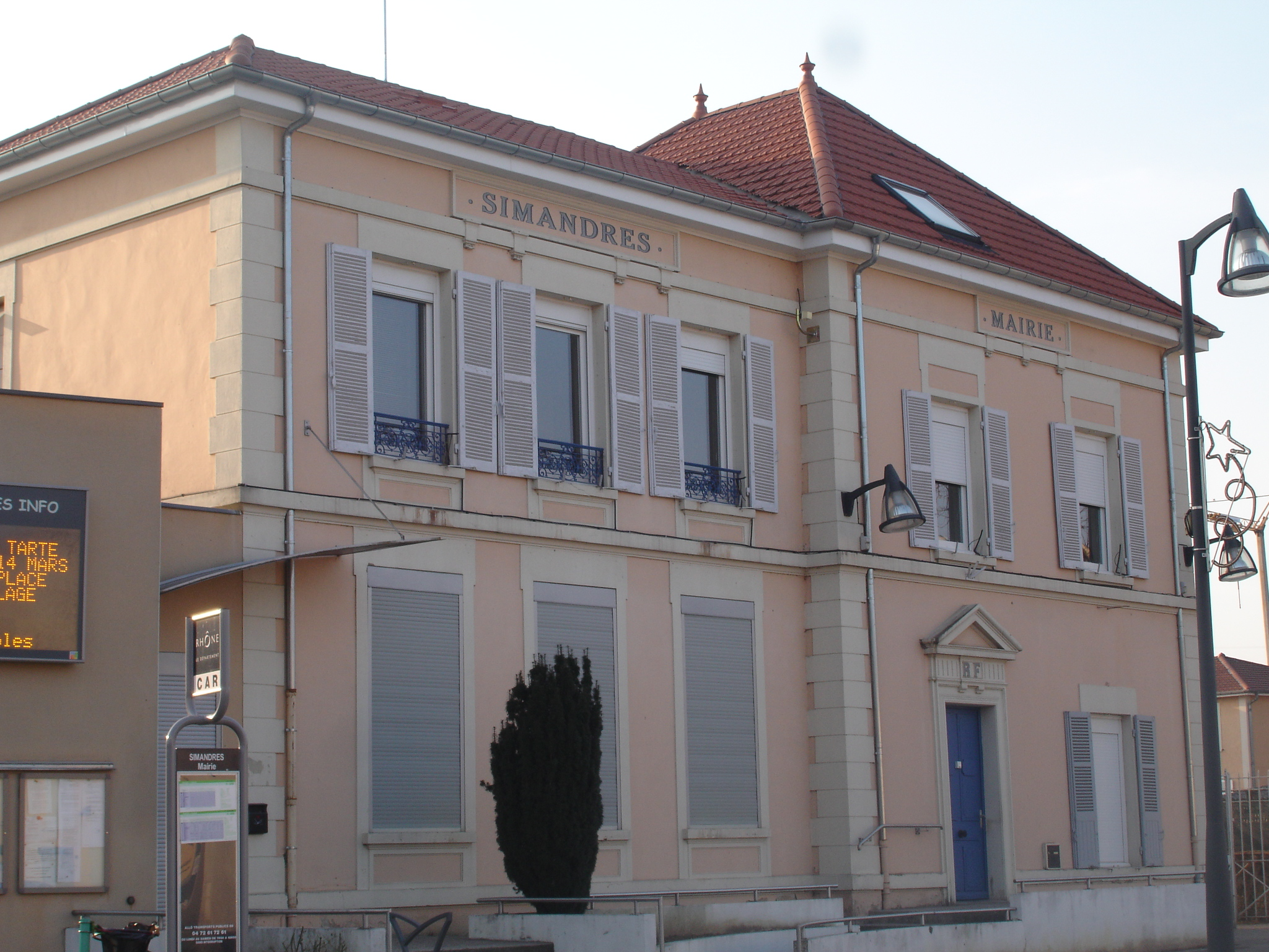 Simandres (69) : La mairie